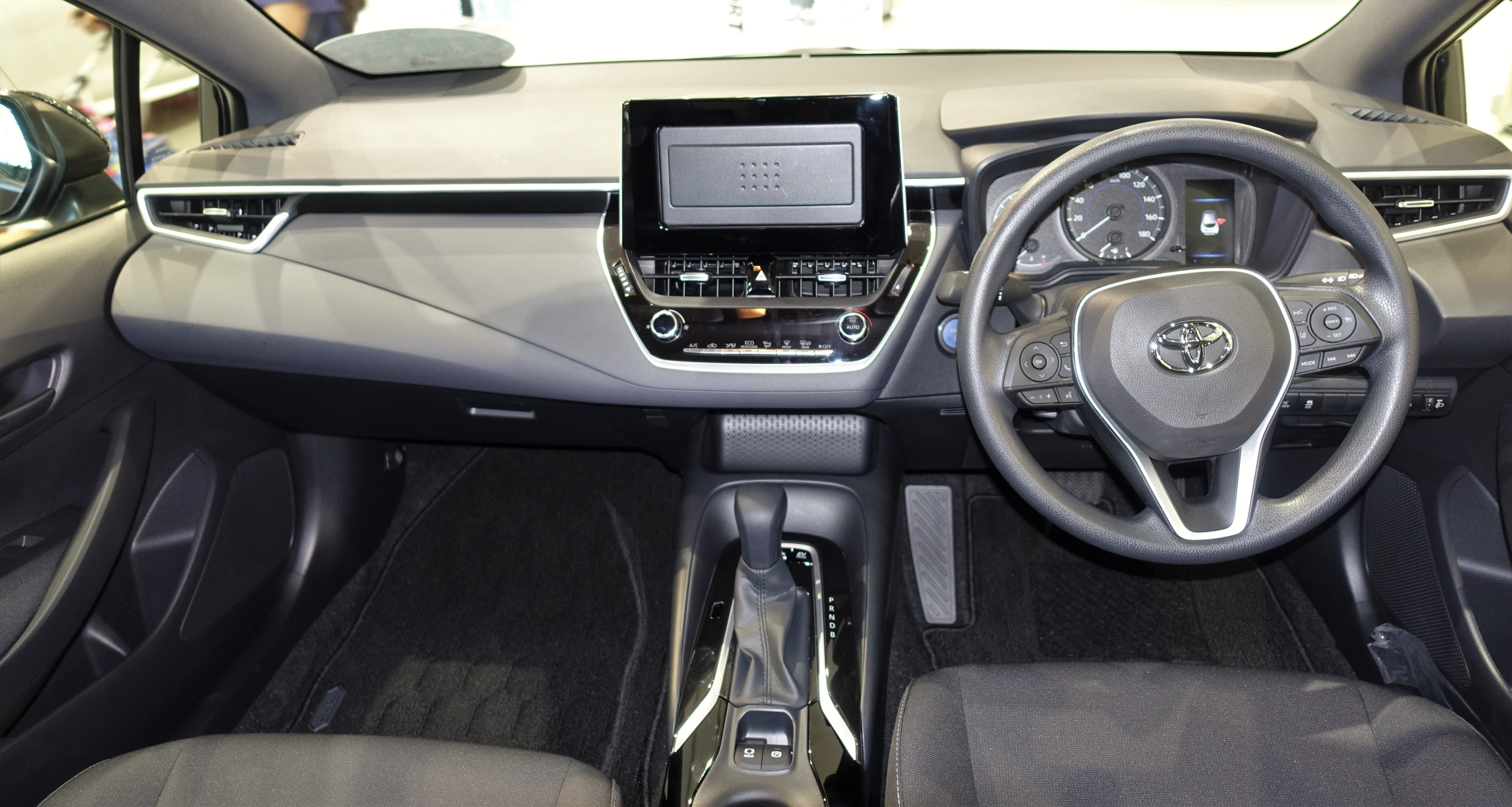 Toyota Corolla Sport